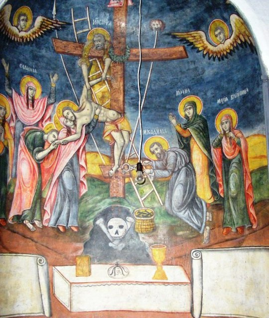 Стенопис в манастирската црква „Света Петка“ в битолското село Цапари.